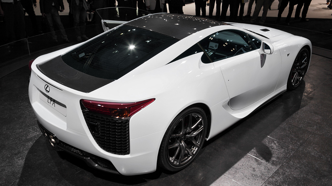 Lxus LFA.